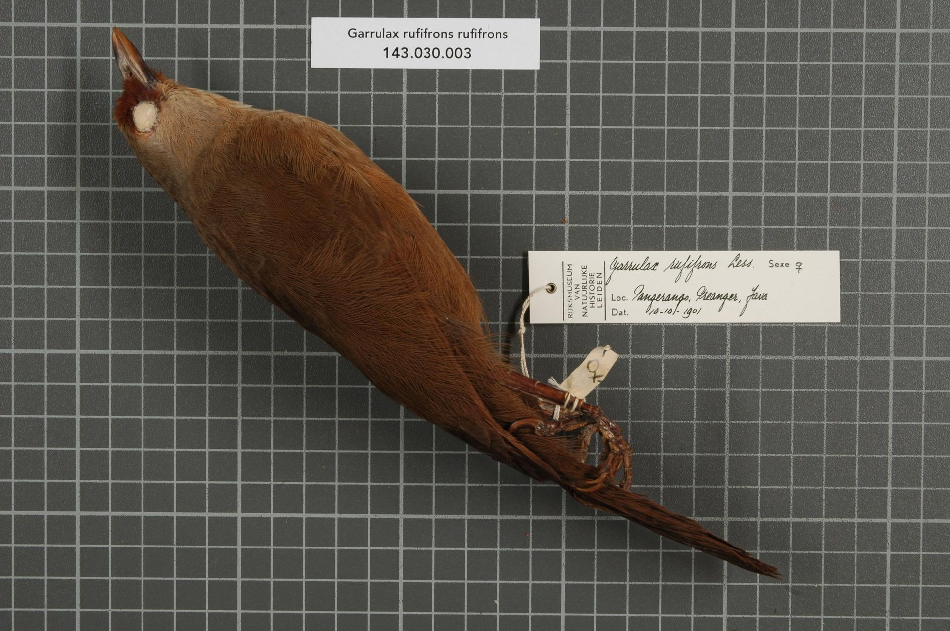 Garrulax rufifrons rufifrons Lesson, 1831